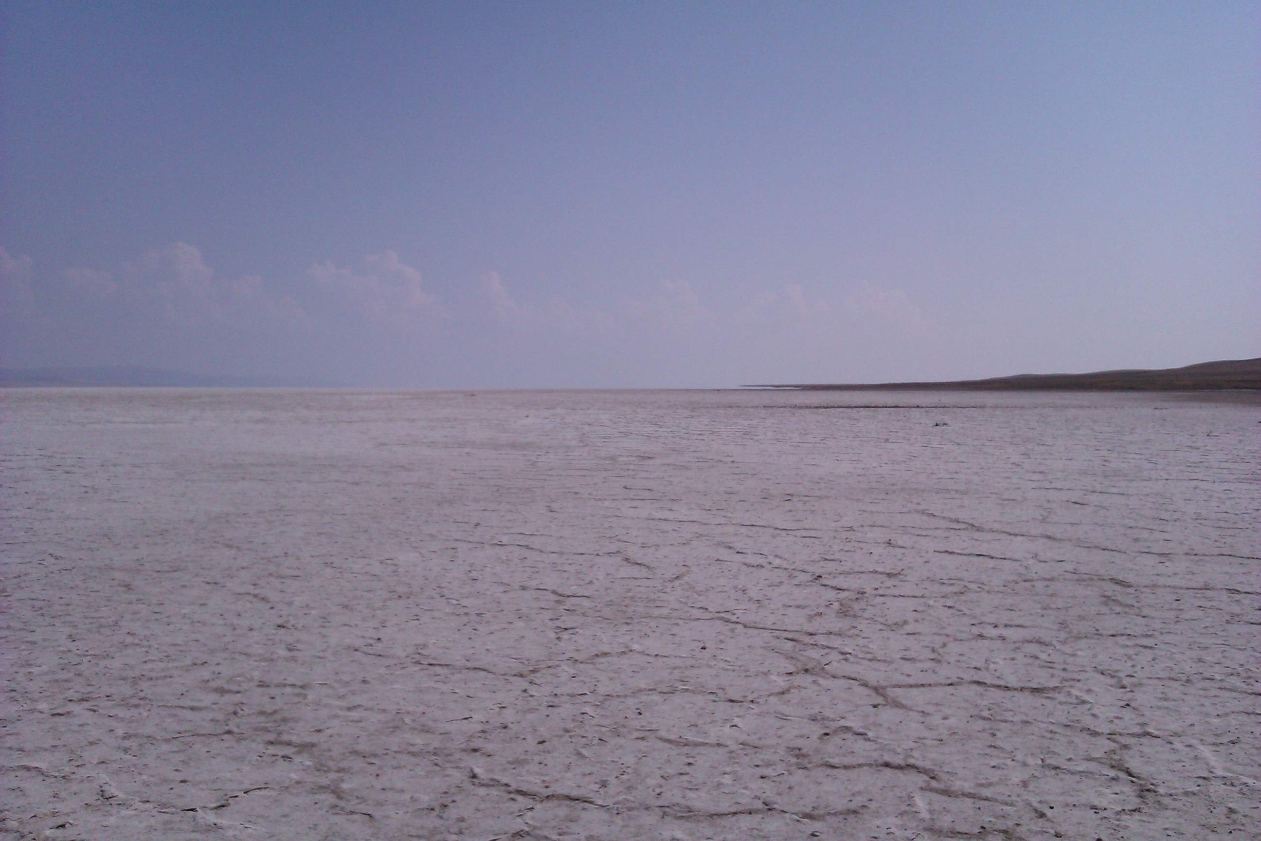 Tuz gölü Şereflikoçhisar ilçesi tarafından bir bölüm